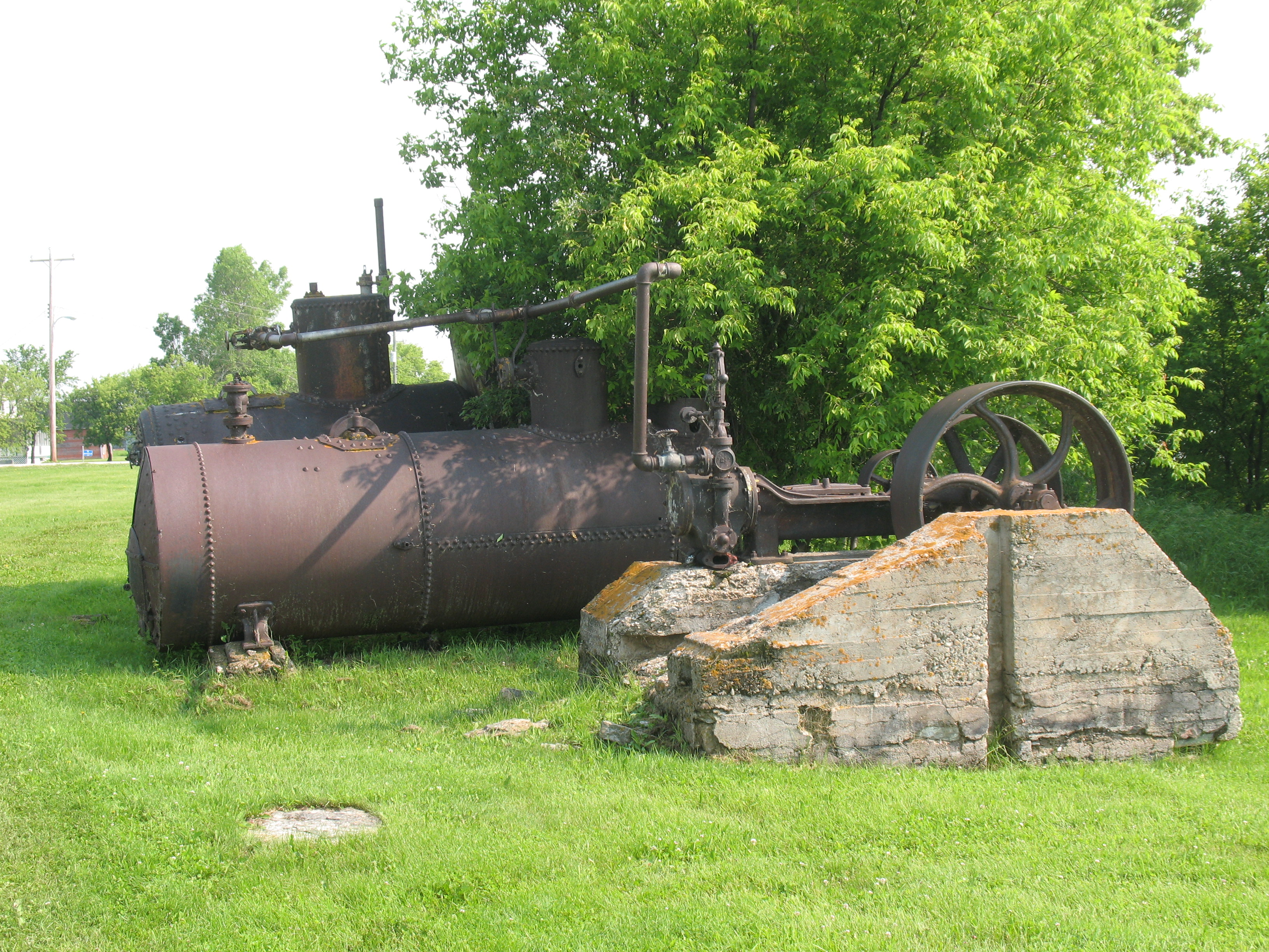 Hecla, Manitoba, Dampfmaschine für die Sägemühle